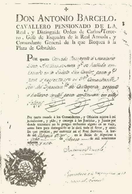 LEYENDA:"DON ANTONIO BARCELO, CAVALLERO PENSIONADO DE LA Real, y Distinguida Orden de Carlos Tercero, Gefe de Escuadra de la Real Armada, y Comandante General de la que Bloquea á la Plaza de Gibraltàr. Por quanto concedo..." NOTA: Pasaporte expedido por el Almirante Antonio Barceló durante el Gran Sitio de Gibraltar como Jefe de la Escuadra de Bloqueo a bordo del Jabeque "Pilar" fechado el 8 de Febrero de 1781. Mediante el cual releva de su destino al artillero de Marina Mariano Libra a bordo de la Galeota "San Carlos" por encontrarse "inútil para el servicio de aquellas fatigas" que representaban el largo asedio, para ponerlo a disposición del Comandante del Departamento de Cartagena. Abajo consta el escudo de Armas de Barceló, su firma y el "anotado y cumplido" del pasaporte que indica que el susodicho artillero pasó a estar destinado al Arsenal de Cartagena.